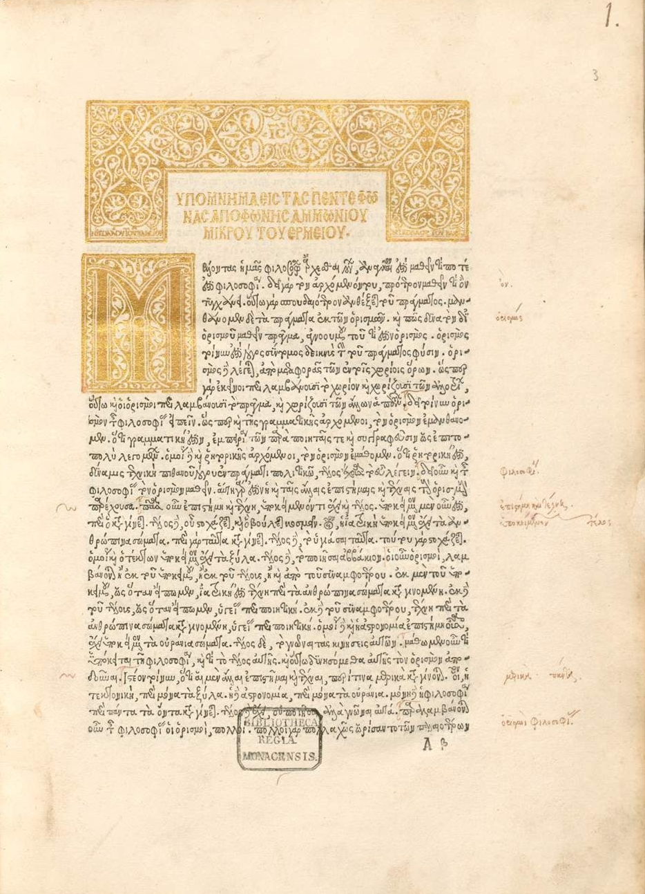 Erste Seite der von Zacharias Kalliergis besorgten und von Nikolaos Vlastos verlegten Erstausgabe der Hypomnema in quinque voces Porphyrii (Isagogoe) des Ammonios Hermeiou, Venedig 1500